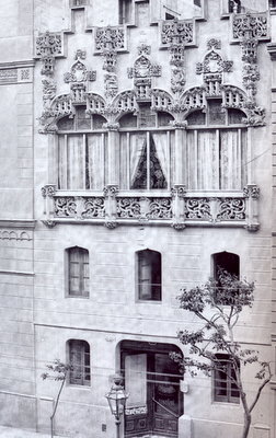 Casa Sicart, obra d'Antoni m. Gallissà de 1906 al c/ Fontanella,3 (Barcelona-Catalunya). La casa va ser enderrocada als anys 1970, si bé una reproducció de la tribuna del 3er. pis es conserva en la mateixa ubicació.